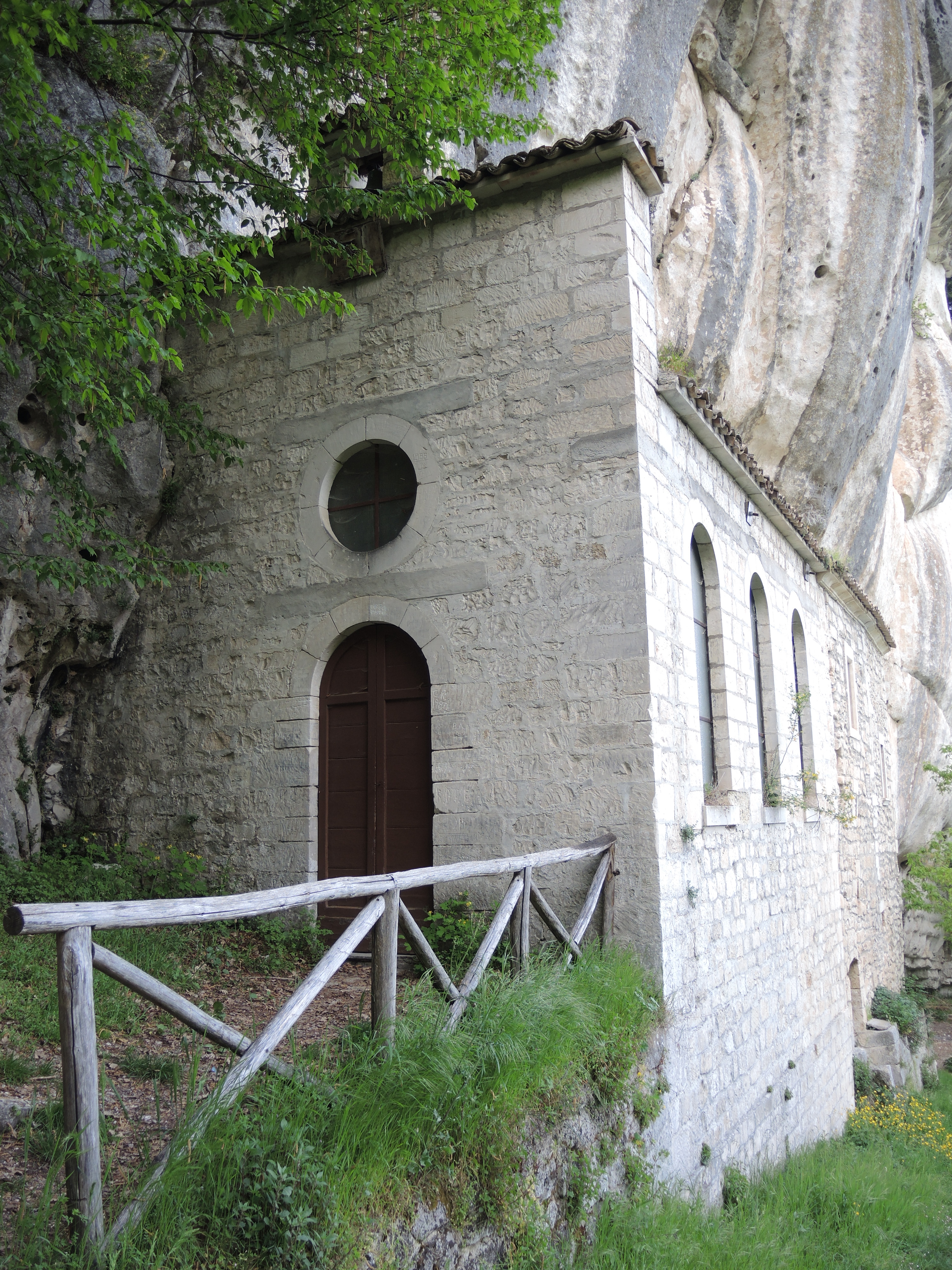 Serramonacesca: Eremo di Sant'Onofrio